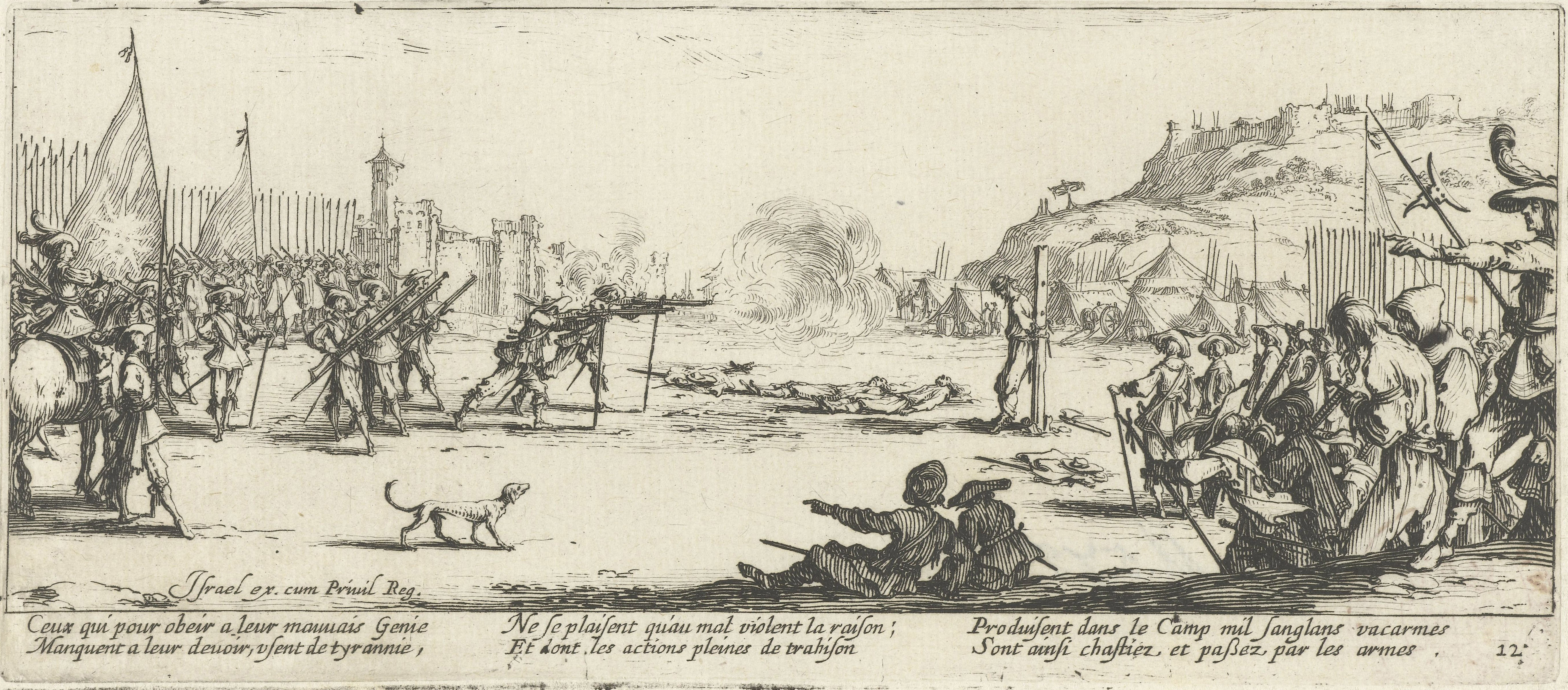 Jacques Callot, La fucilazione, tavola 12 delle Les misères et les malheurs de la guerre